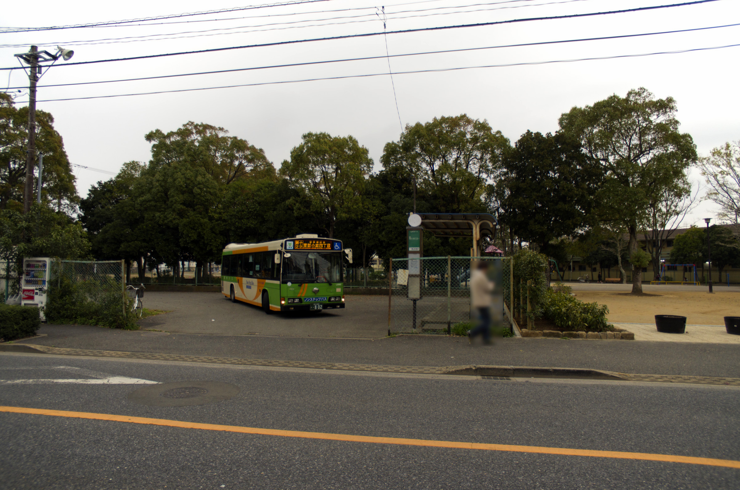 都営バス 日野自動車 KL-HR1JNEE 新小29乙系統春江町終点 V-L690